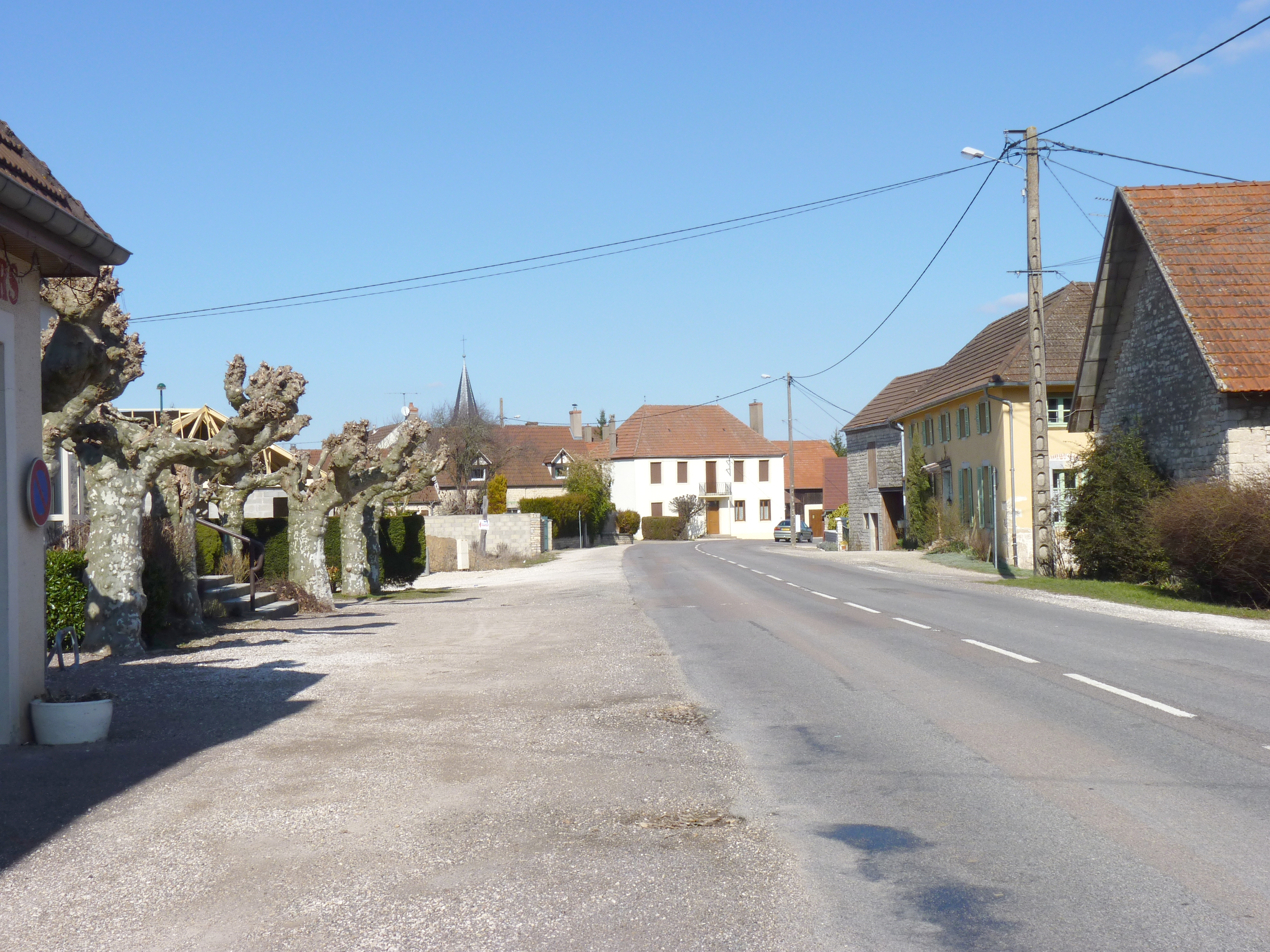 Rue Principale, direction nord, Aubigny-en-Plaine (Côte d'Or, Bourgogne, France)